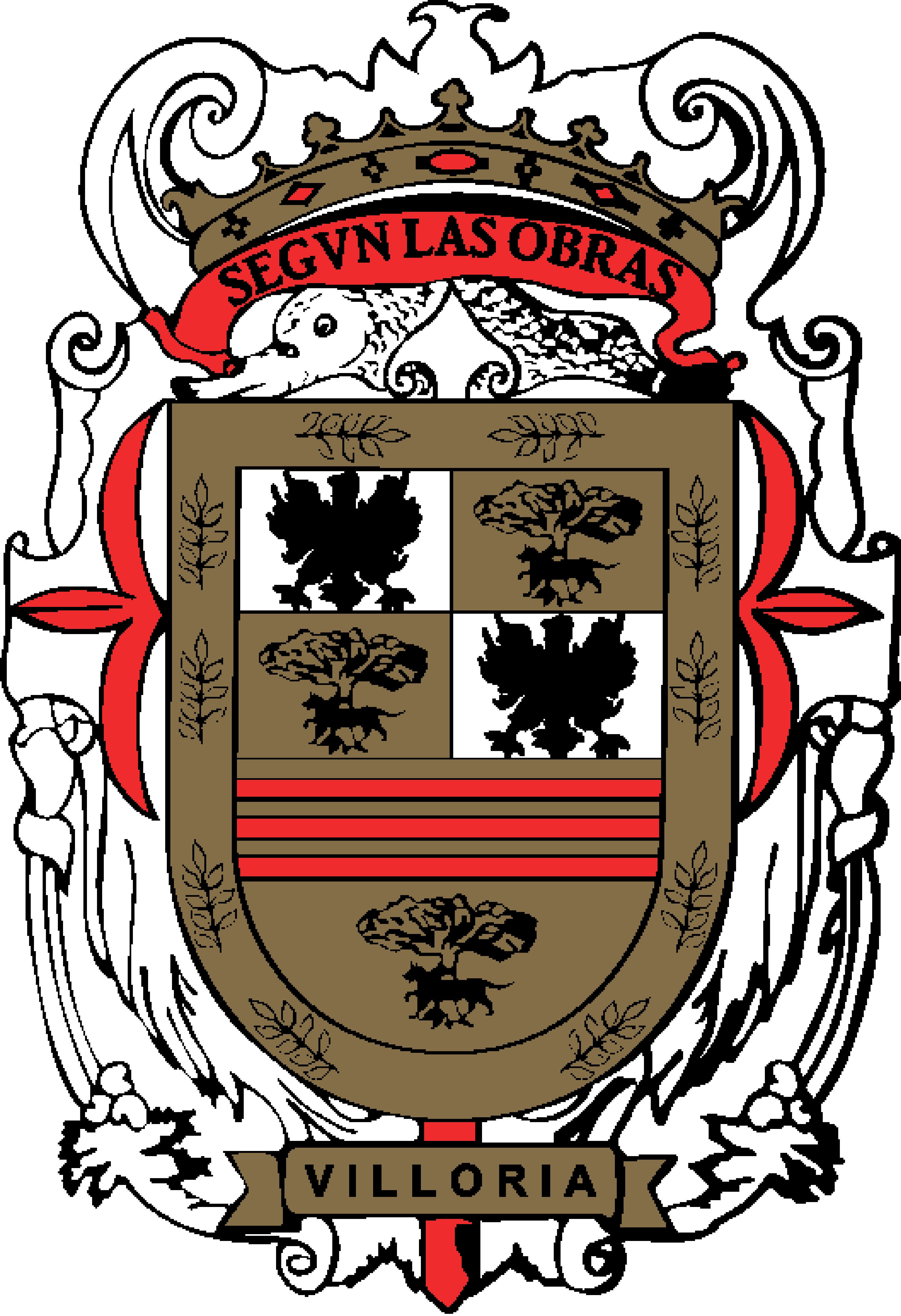 El escudo de Villoria (Salamanca) representa las armas de los Ruiz de Vergara: Escudo cortado: 1: cuartelado: 1 y 4) en campo de plata un águila de sable; 2 y 3) en campo de plata una encina de sinople atravesada al pie de un lobo de sable; 2: en campo de oro un árbol de sinople y atravesada a su pie una loba al natural y encadenada, y jefe de azur con tres fajas de oro; bordura del escudo de oro con diez ramas de encina de sinople; Lema:«Según las Obras»